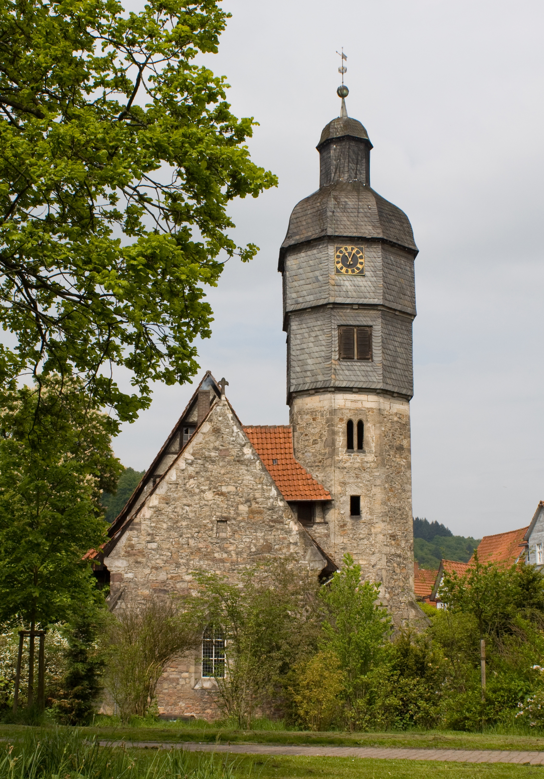 Hann. Münden, Ägidienkirche